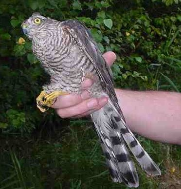 Sperwer (2-jarig vrouwtje).Bron: VogelRingStation Schiermonnikoog. Gebruik toegestaan met bronvermelding. Afbeelding is gecropt ten opzichte van het origineel.